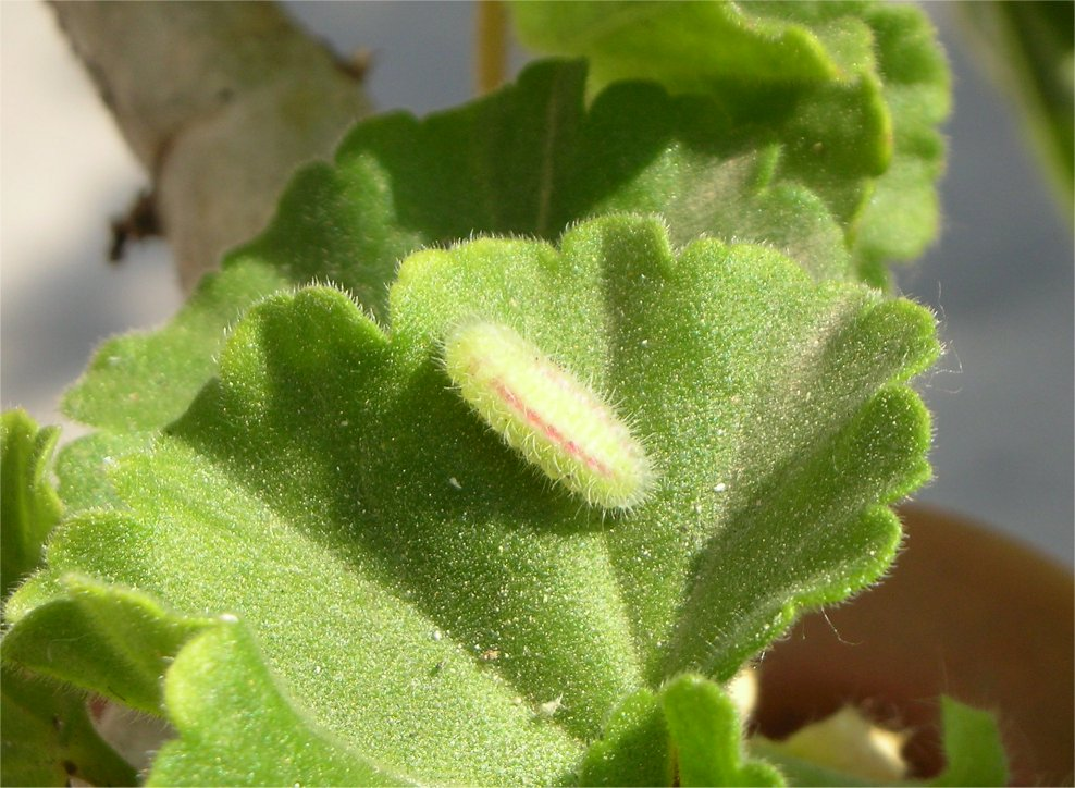 Cacyreus marshalli - larva su foglia di Geranio